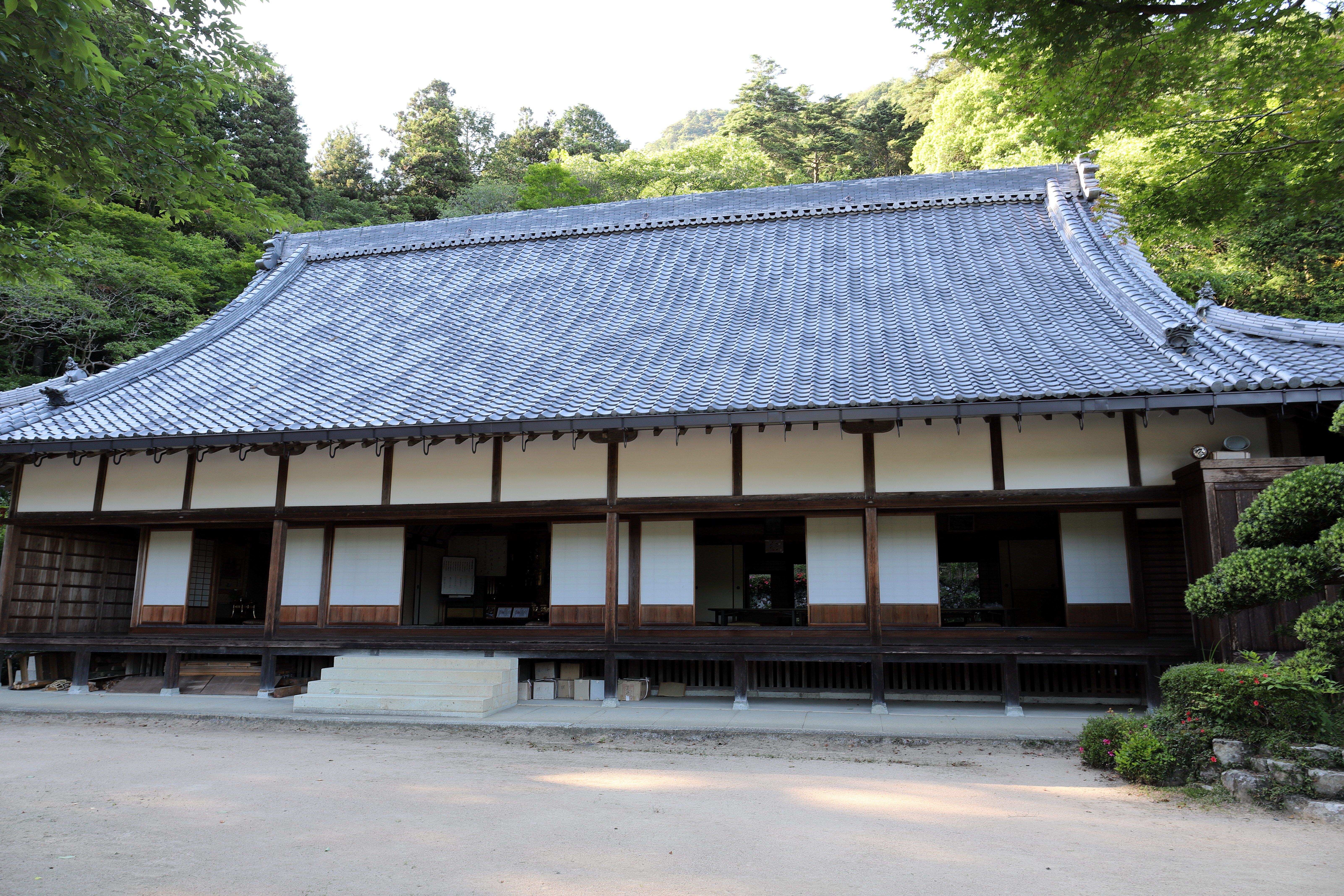 延命寺 本堂 Canon EOS 6D Mark II